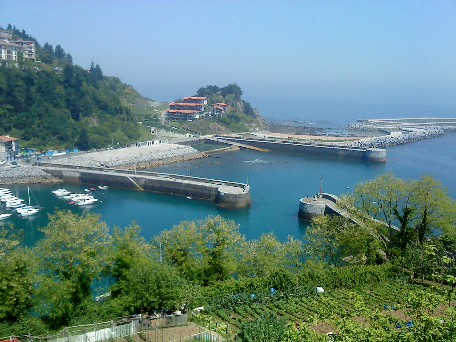 Motrico, vista del nuevo muelle de abrigo.